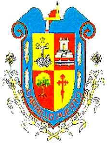 Escudo de Carrillo Puerto